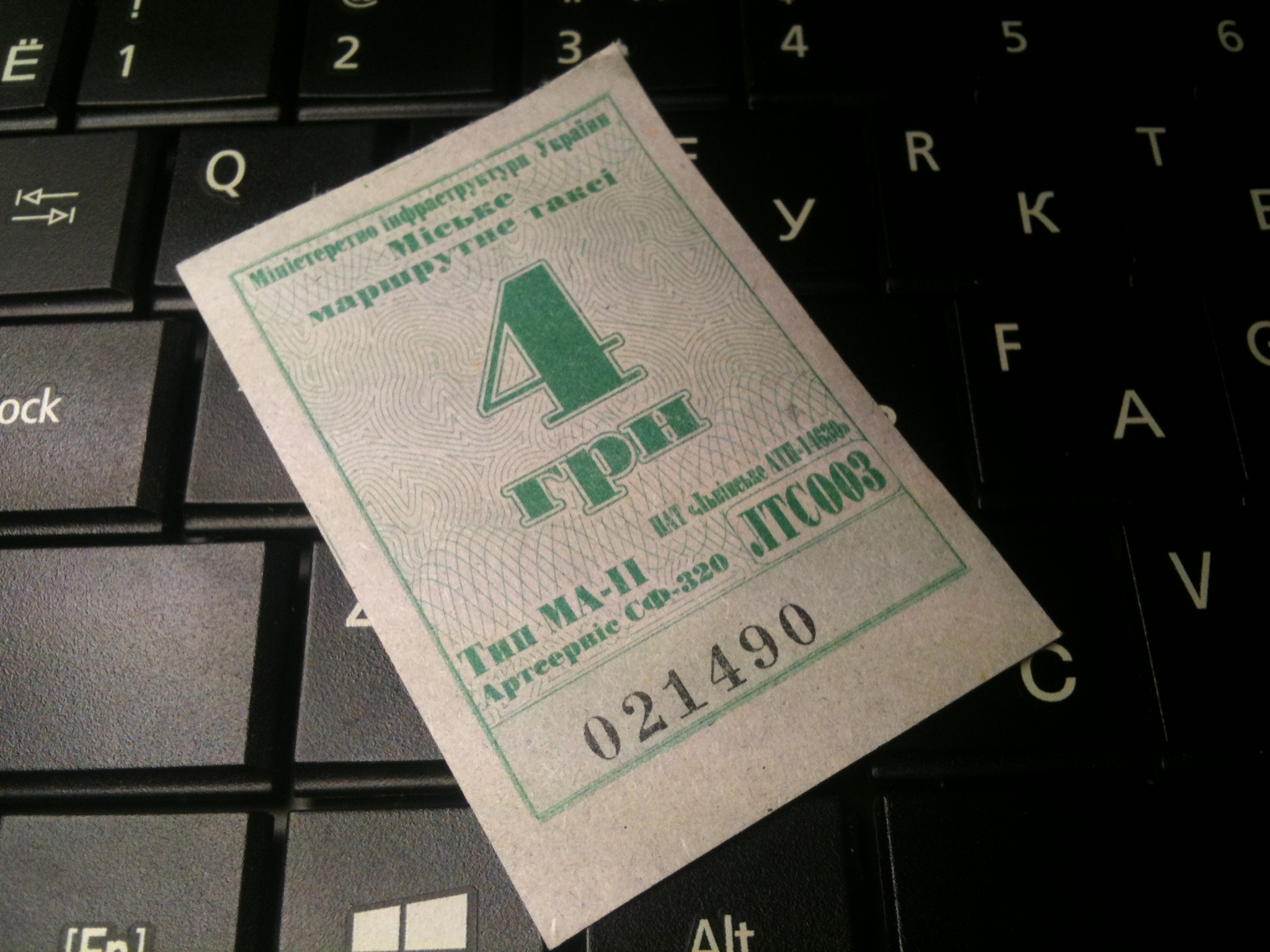 Квиток на проїзд в маршрутному таксі Львова (2015)